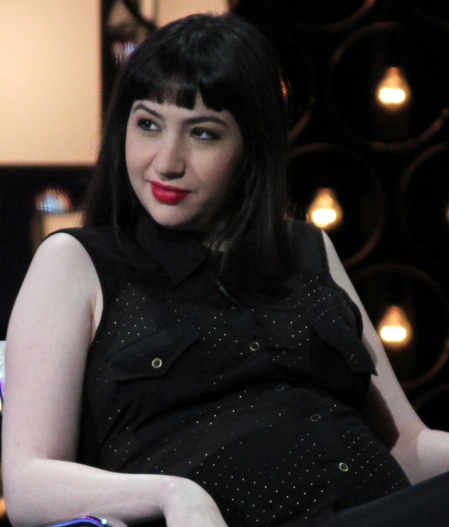 Matías Martin y Sofía Gala en Línea de tiempo. 27.10.2014. Foto TVP 2014